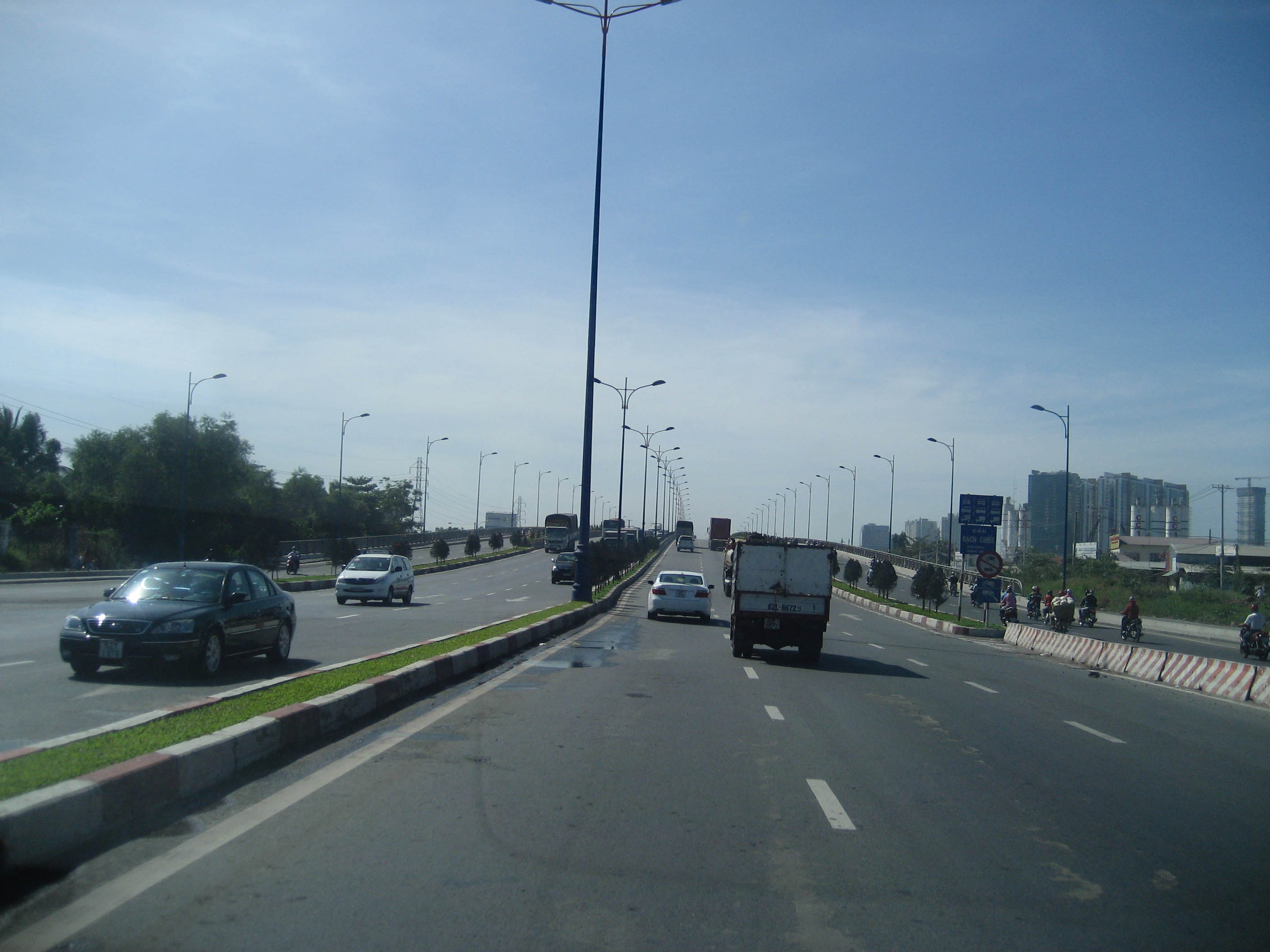 Cầu Rạch Chiếc, Thành phố Hồ Chí Minh